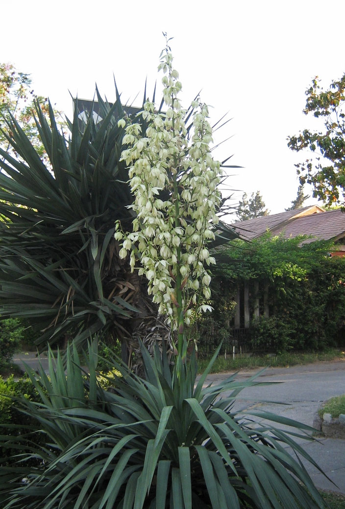 Yucca ex hortus